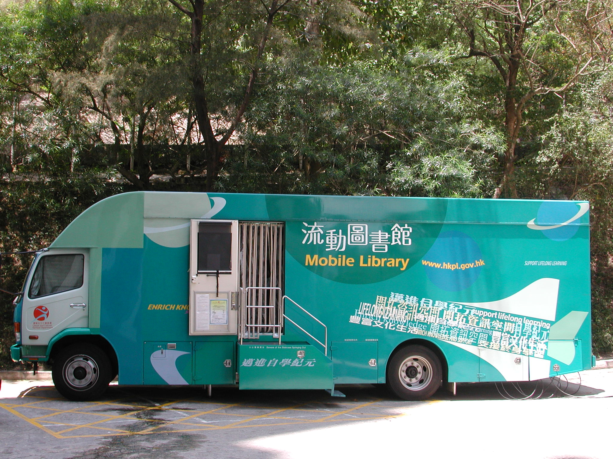 中文（香港）: 康樂及文化事務署七號流動圖書館在翠竹花園內服務。